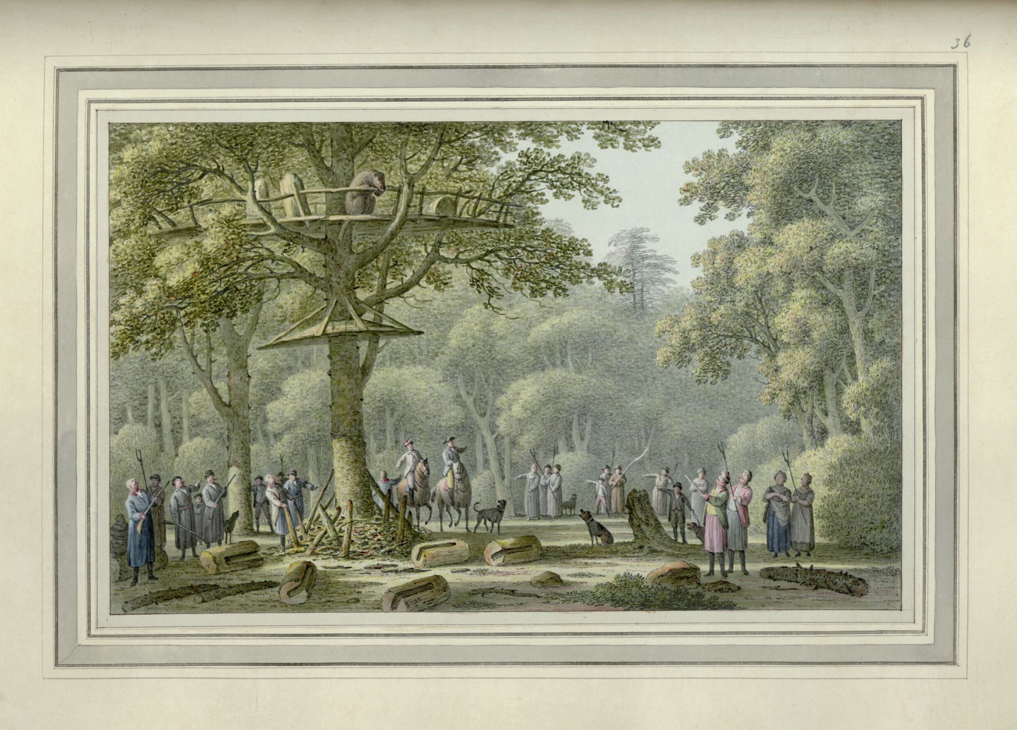 Беларуская (тарашкевіца): Белавеская пушча (Biełavieskaja pušča). Паляваньне на мядзьведзя